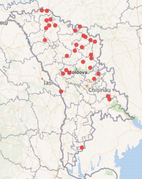 Harta monumentelor naturii de tip hidrologic din Republica Moldova